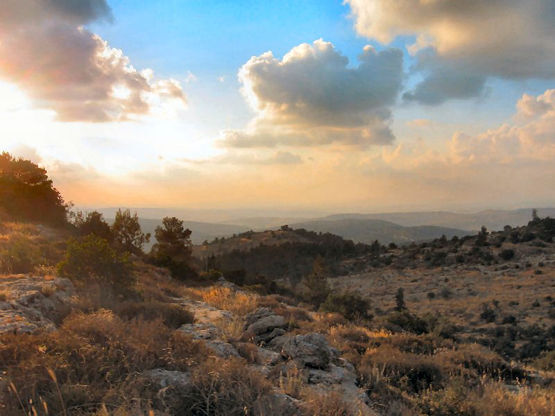 Panorama_to_judea_valley